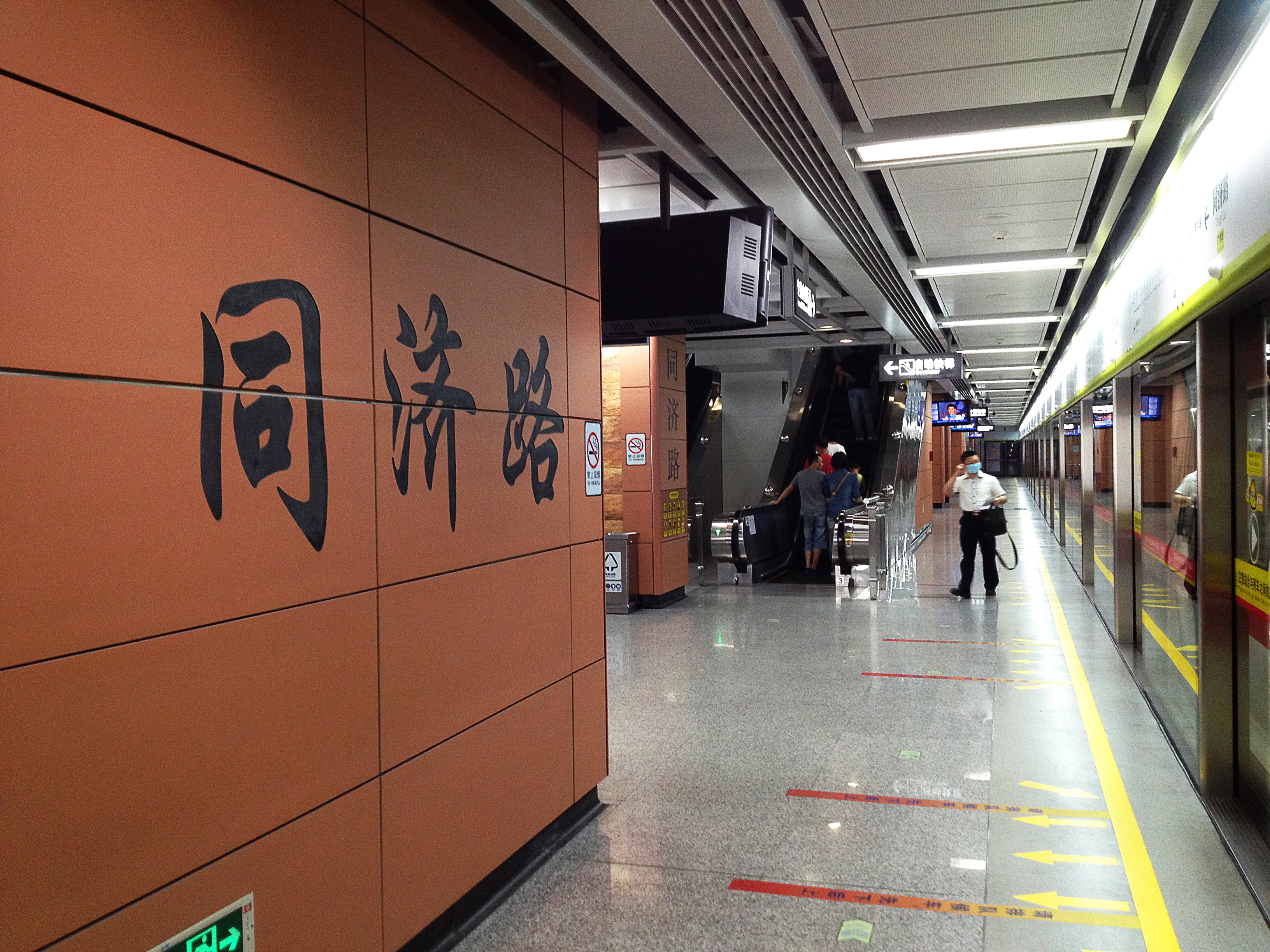 广佛地铁同济路站月台（往魁奇路方向）